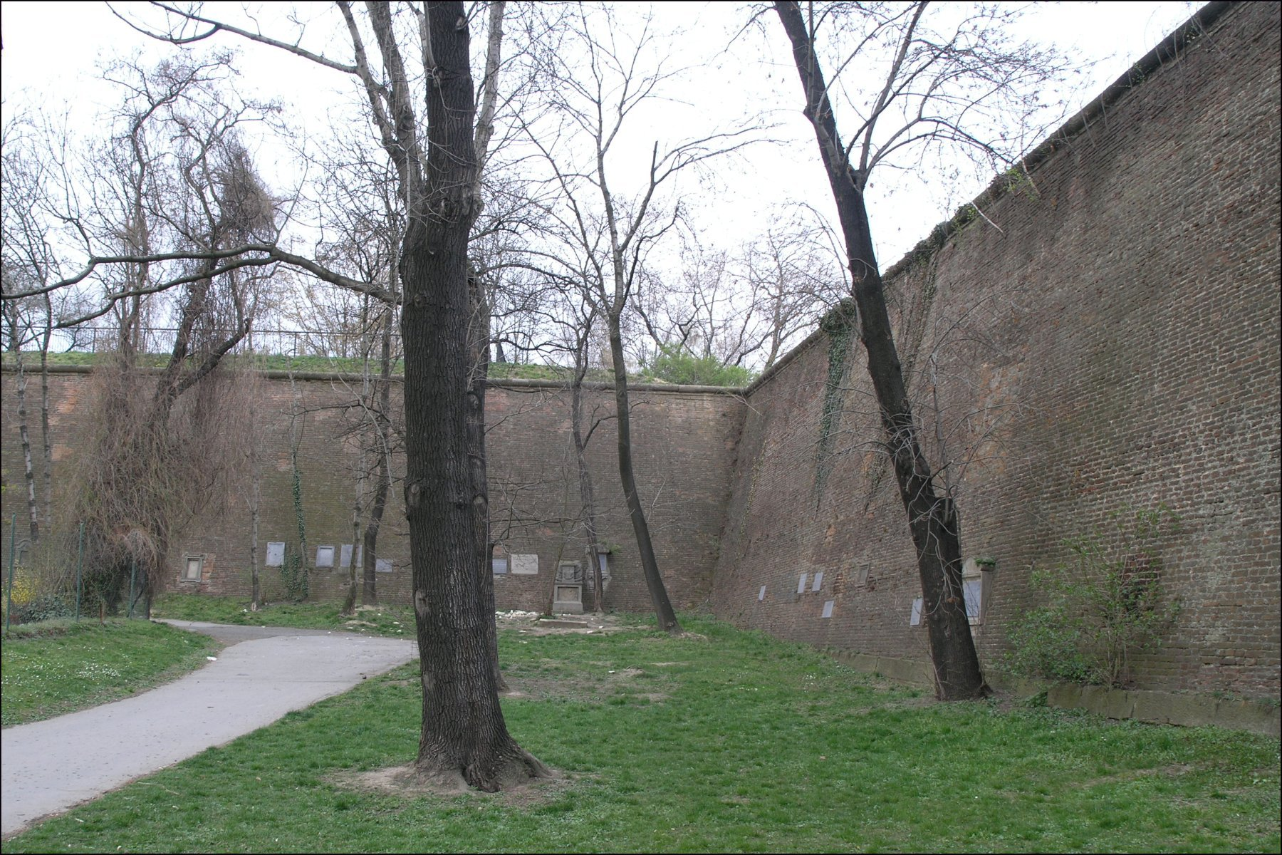 Bývalý vojenský hřbitov Hradčanské dělostřelecké posádky (západně od Keplerovy ulice)